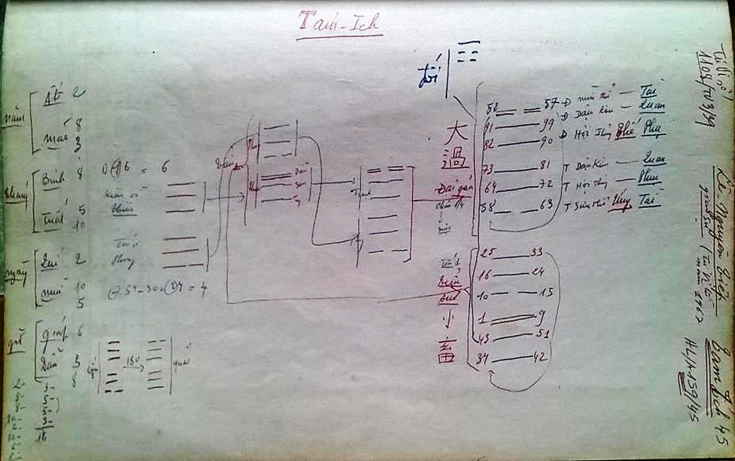 HLTIch